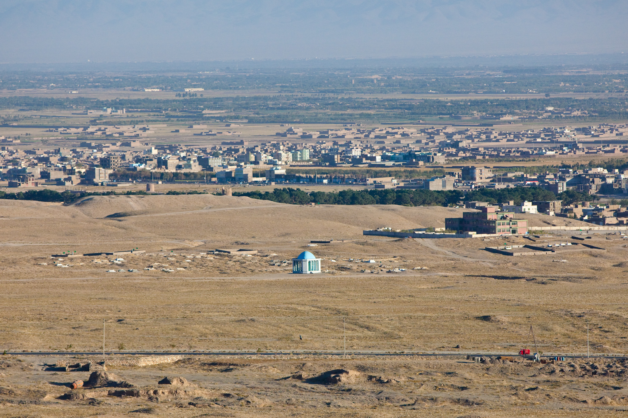 Herat, Afghanistan